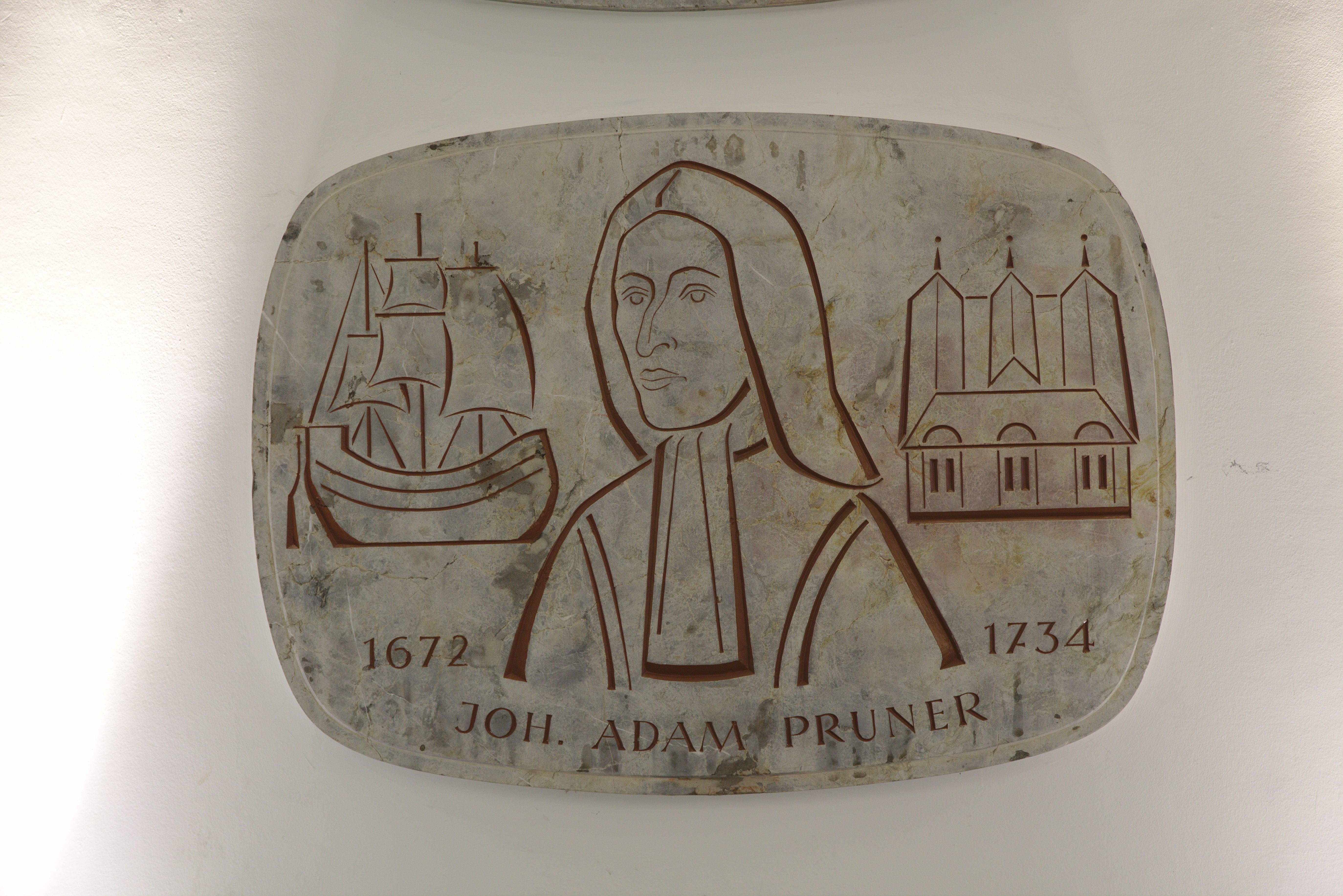 Erinnerungstafel Johann Adam Pruner